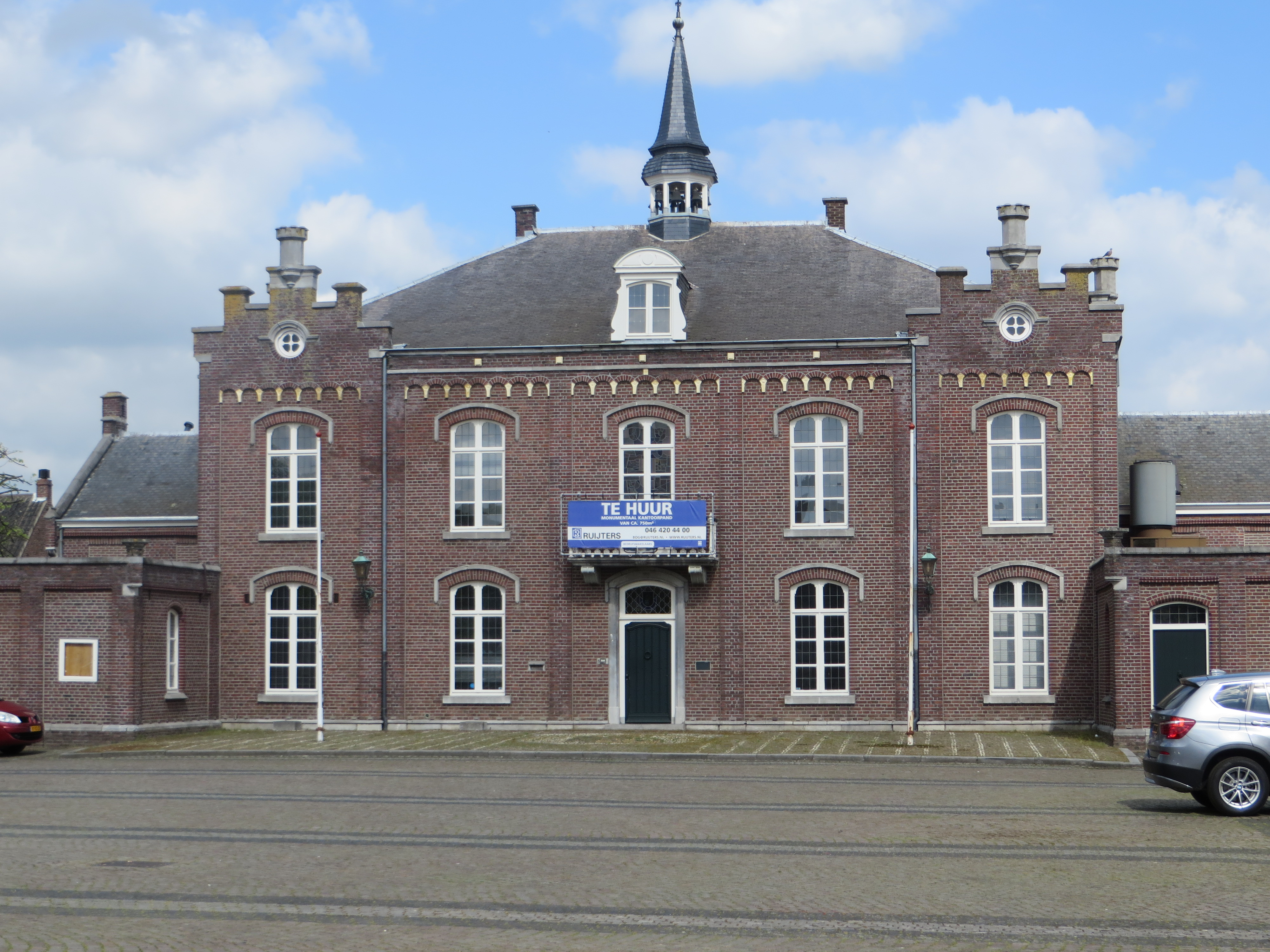 Markt 1, Wessem